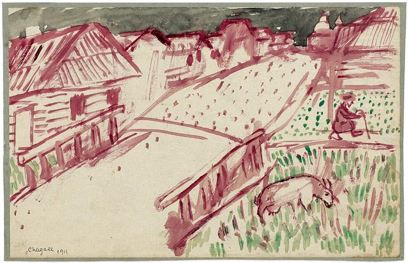 Беларуская (тарашкевіца): Лёзна (Lozna), мост цераз раку Мошну (Mošna). Пэйзаж з казой